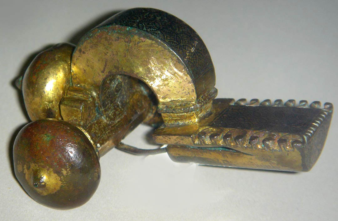 Fibule cruciforme, Musée Régional Rhénan, Bonn (Rheinisches Landesmuseum Bonn)